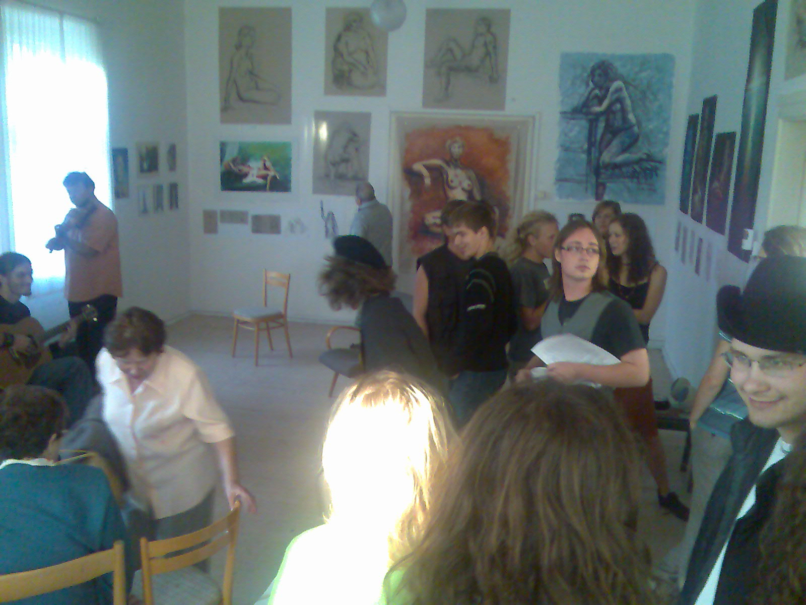 pohled do Galerie Pošta v Dubé, Školní čp. 192. A geocoded location could be added to this image. Visit Commons:Geocoding for information on how to add coordinates. Beta-test: Add coordinates helps to determine coordinates.